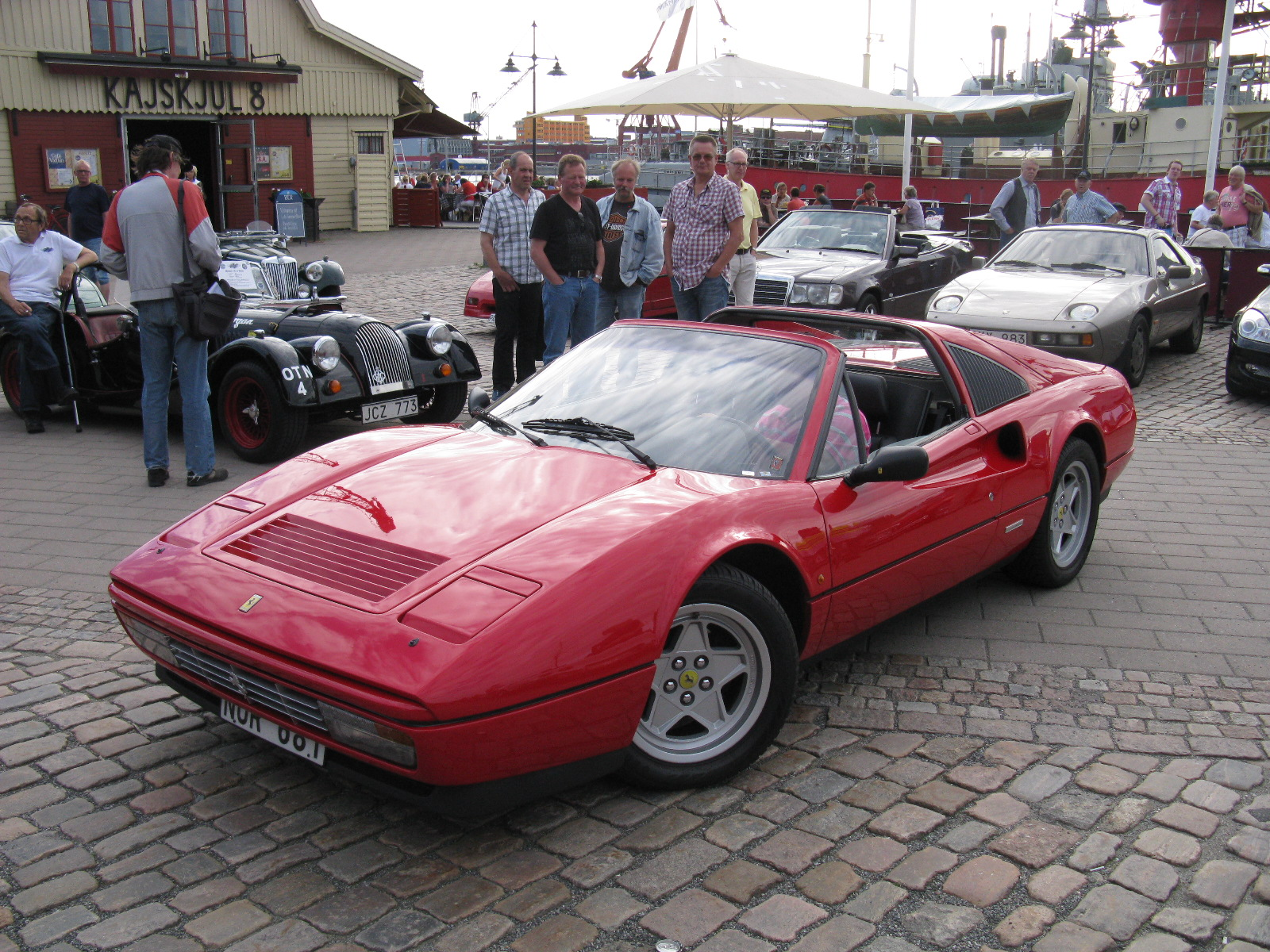 Ferrari 328 GTS